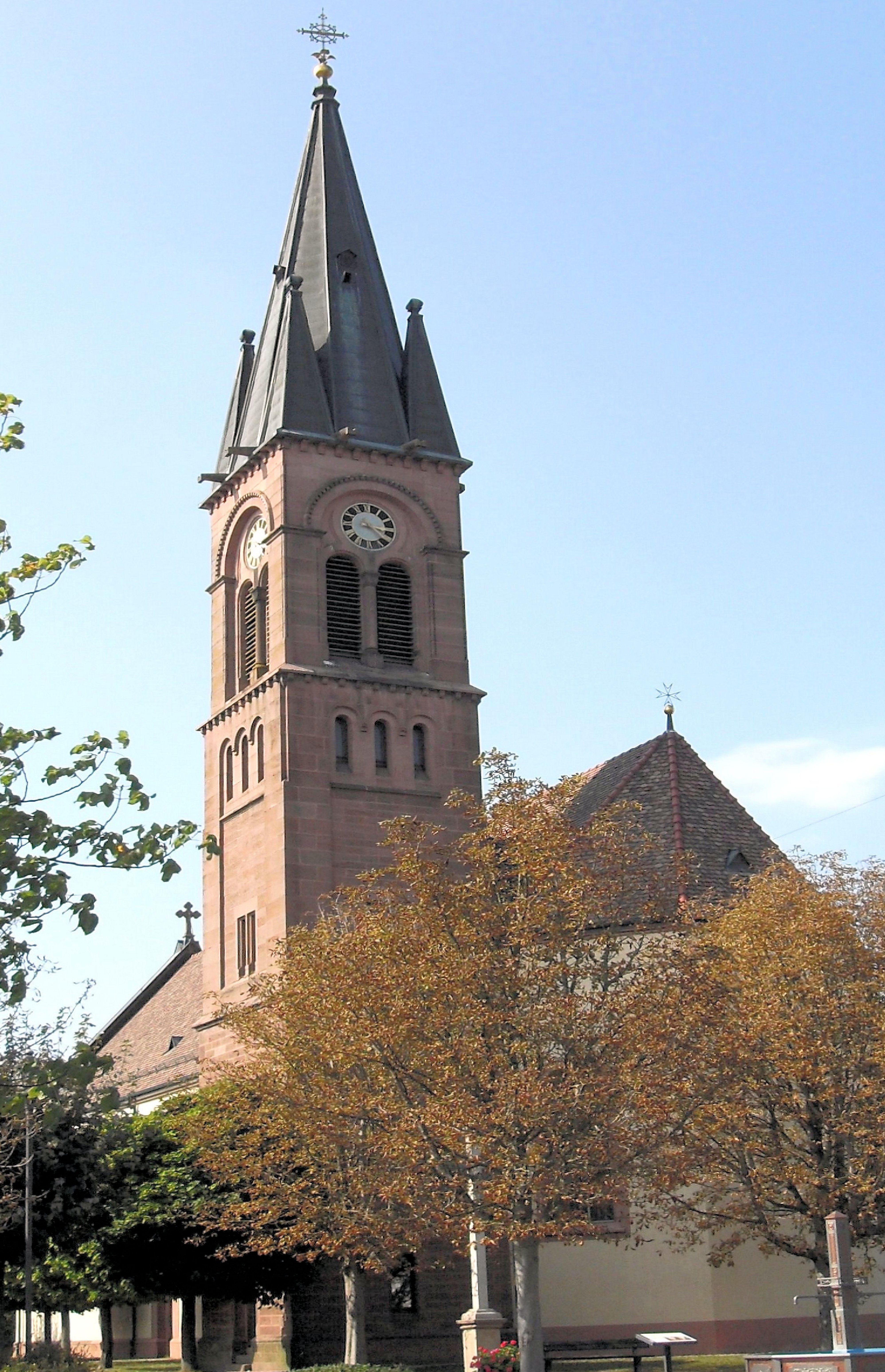 St. Michaelskirche in Gündlingen